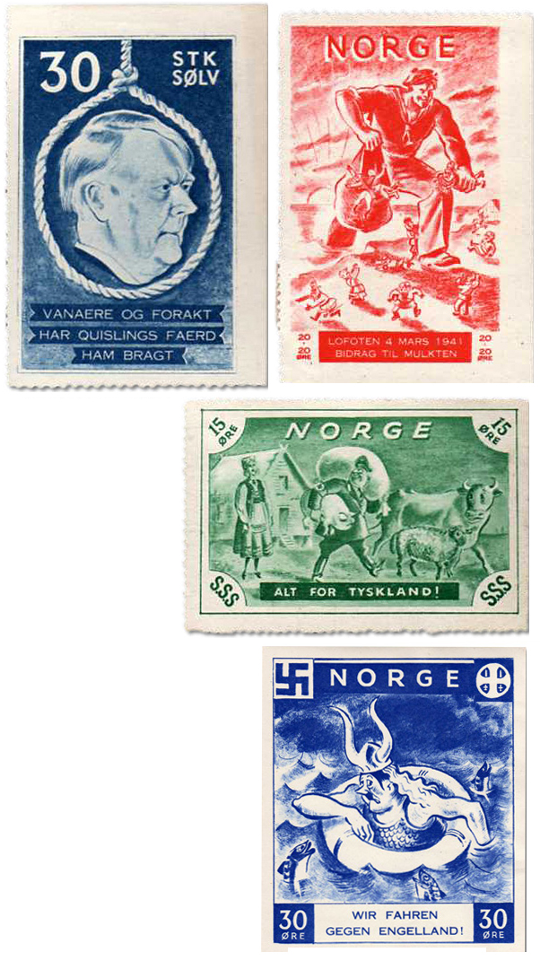 Британские виньетки для оккупированной нацистами Норвегии, 1941 год.